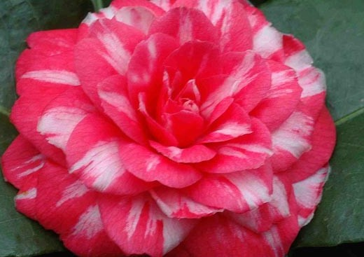 Fotografia di una Camelia maria antonietta.